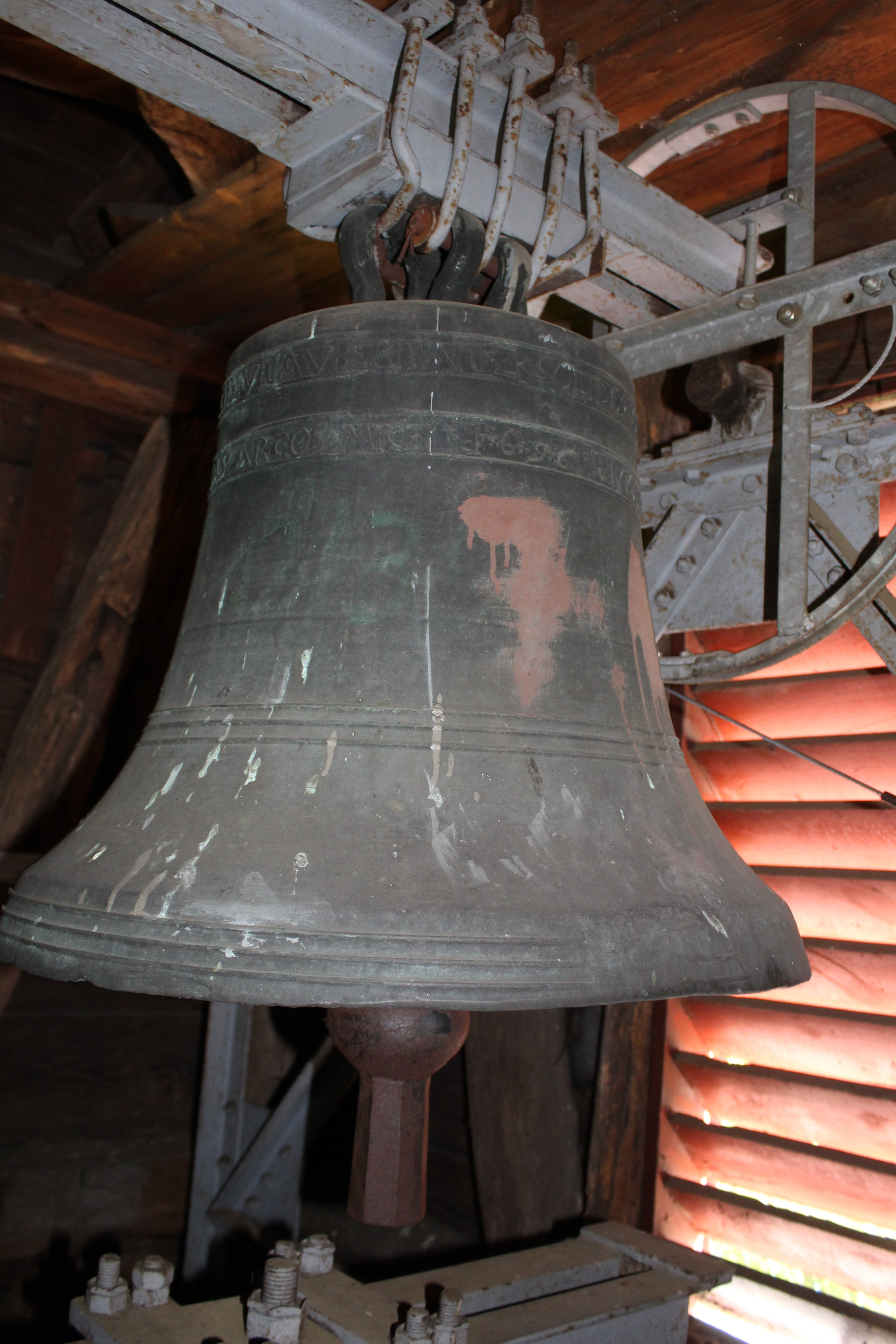 Ev. Kirche Nauborn, Wetzlar, Lahn-Dill-Kreis, Hessen, Deutschland